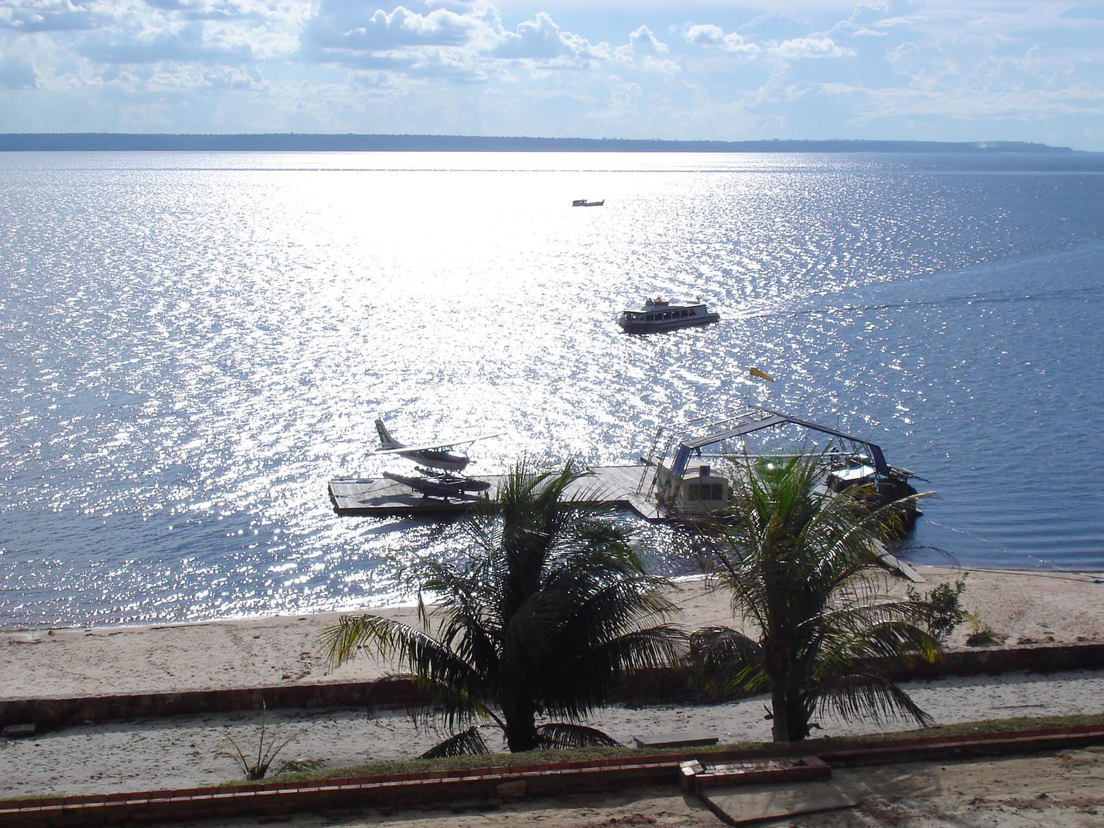 Rio Negro, Manaus - Amazonas